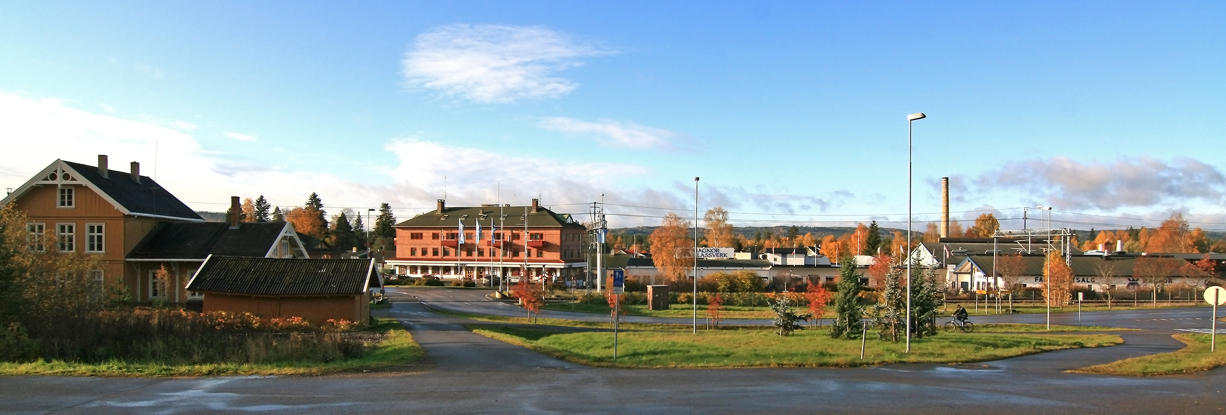 Magnor, Eidskog, Hedmark. Jernbanestasjonen til venstre og Magnor Glassverk til høyre.